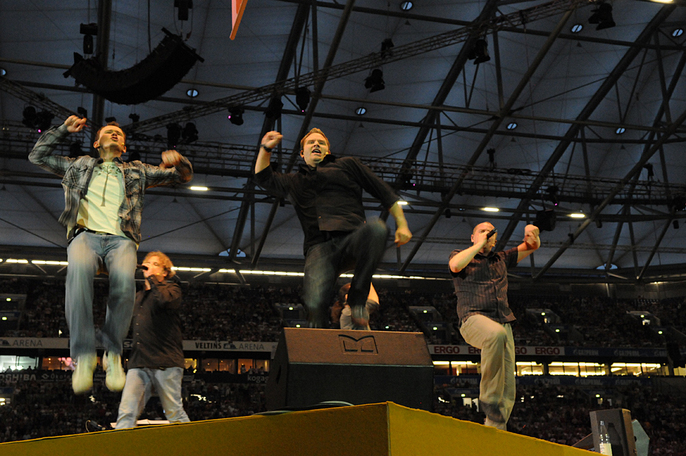 Wise Guys beim Abschlusskonzert von „!SING - DAY OF SONG“ in der Veltins-Arena in Gelsenkirchen